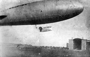 Советский дирижабль СССР В-4 (Комсомольская правда)